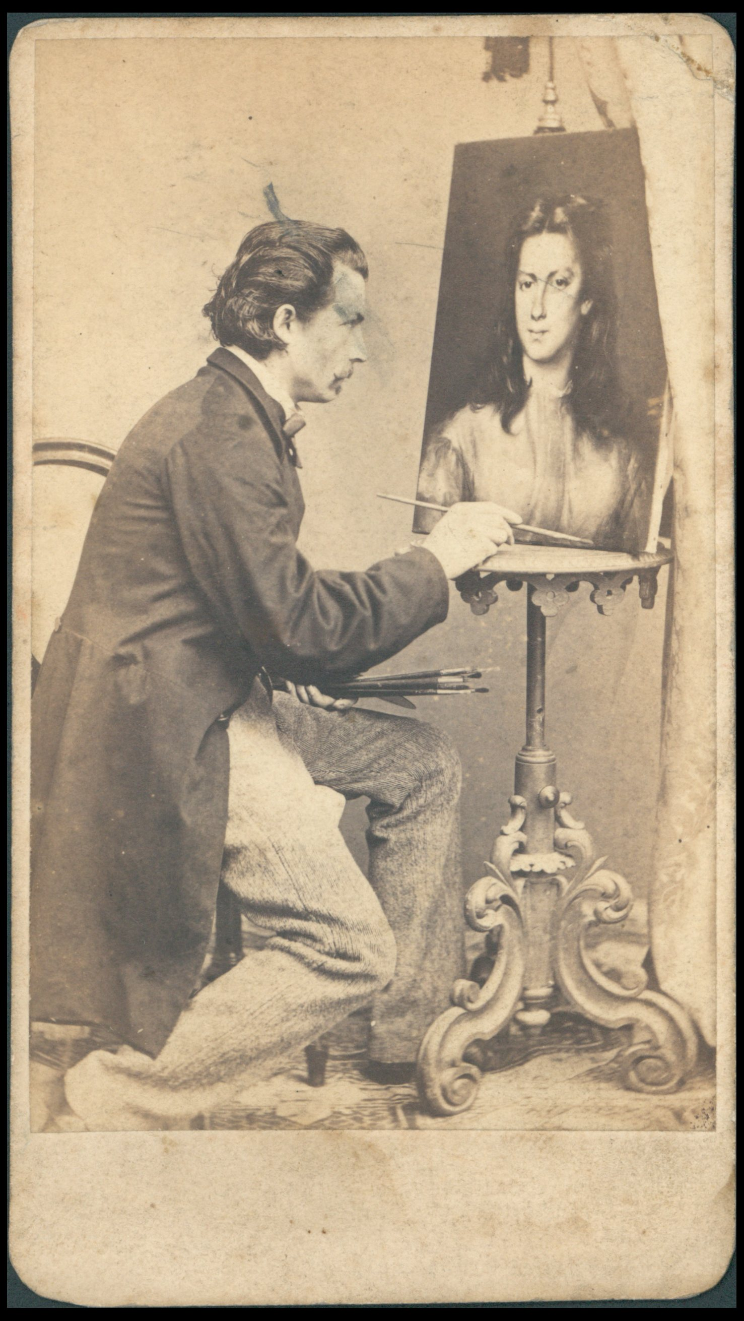 Andrzej Grabowski malujący portret Leopoldyny Kuczyńskiej